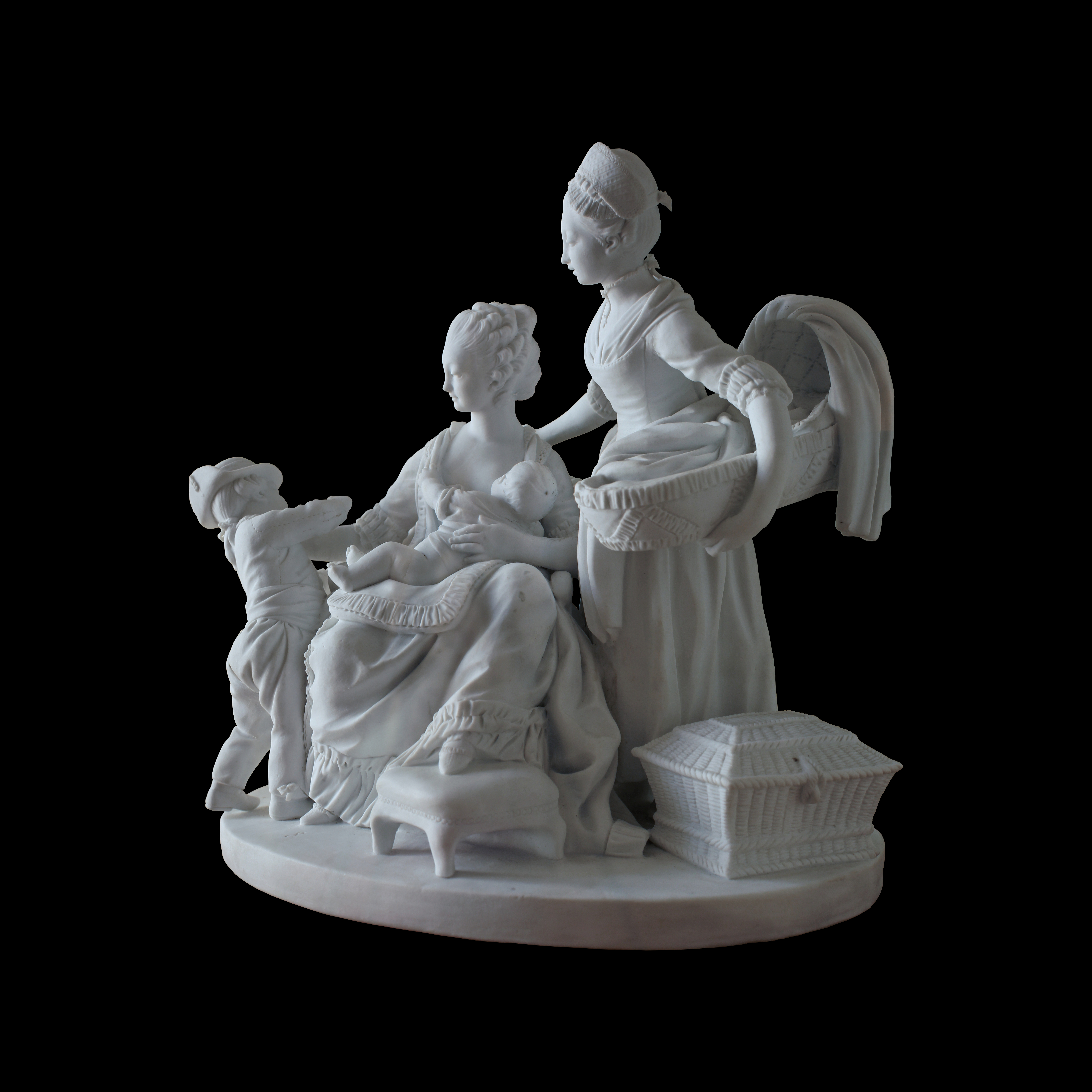 Surtout de table composé de trois pièces : La Nourrice La Toilette Le Déjeuner